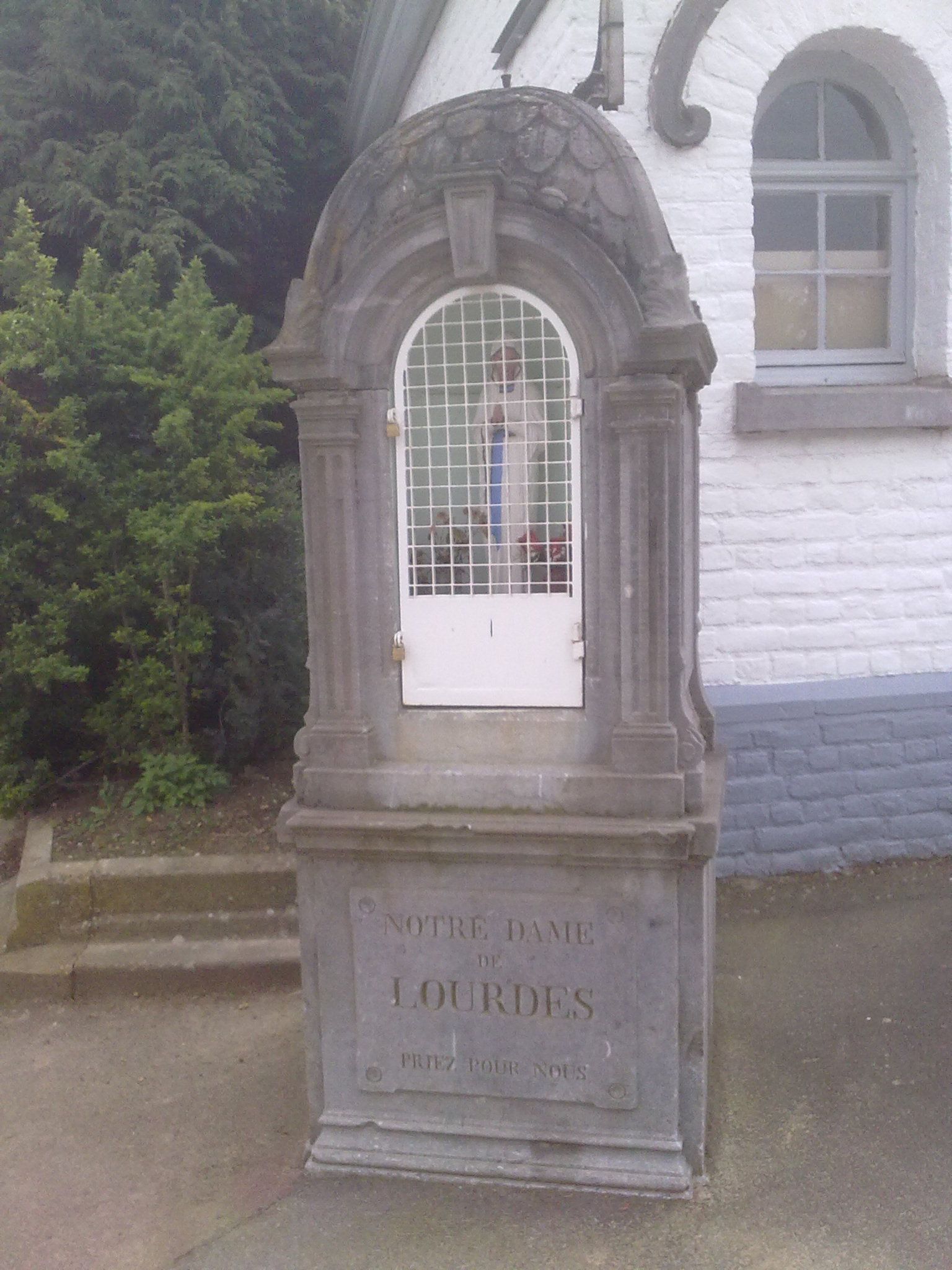 Borne-Chapelle à ND de Lourdes à l'entrée du cimetière, rue des Hayeffes. Sur la face avant : Notre Dame de Lourdes, Priez pour nous" sur la face latérale droite, inscription "Erigé par Monsieur Ferdinand DEMEURS en l'année 1874".